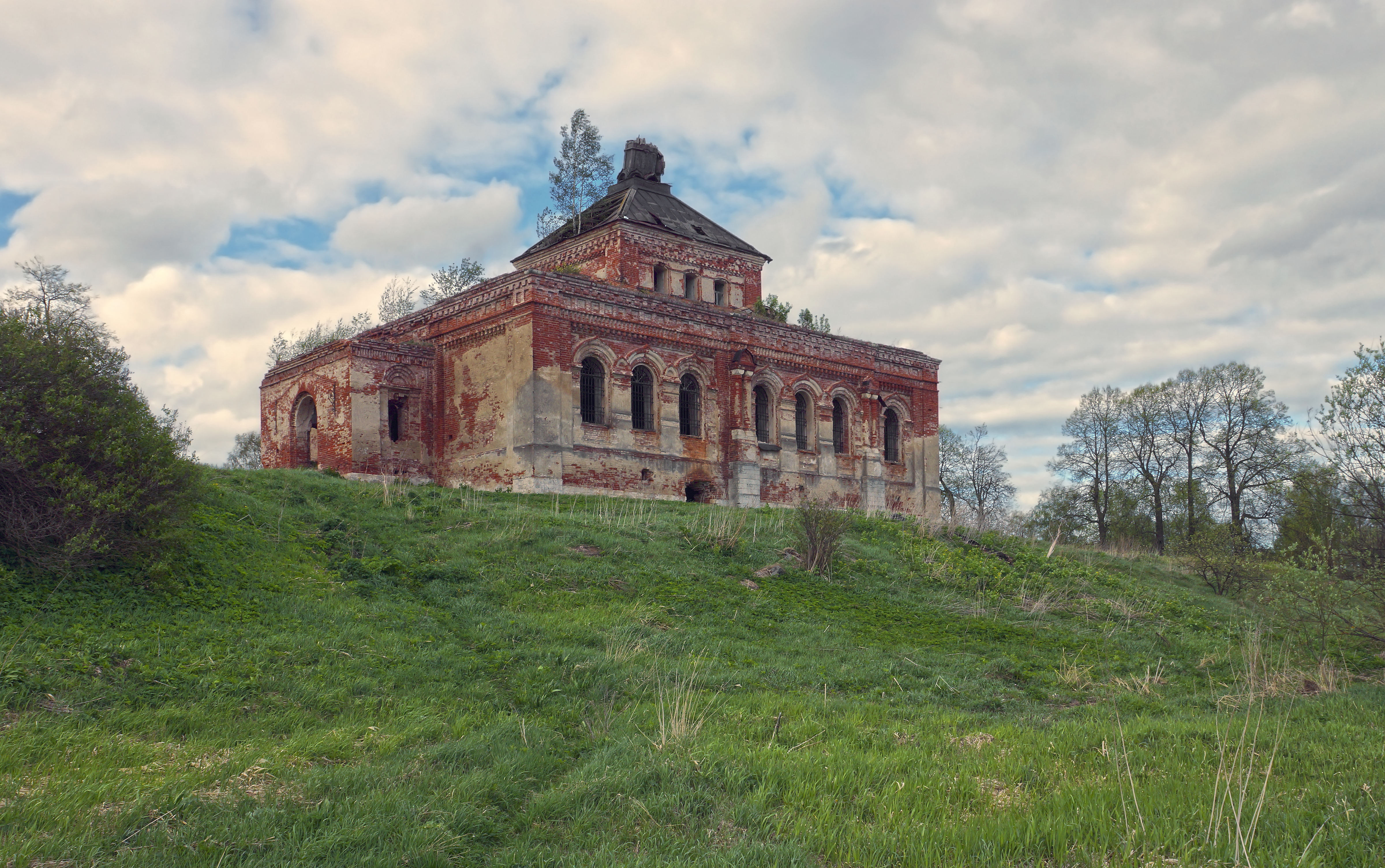 Храмовый комплекс: Кунгалово, Торжокский район, Тверская область